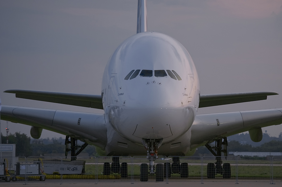 Evening